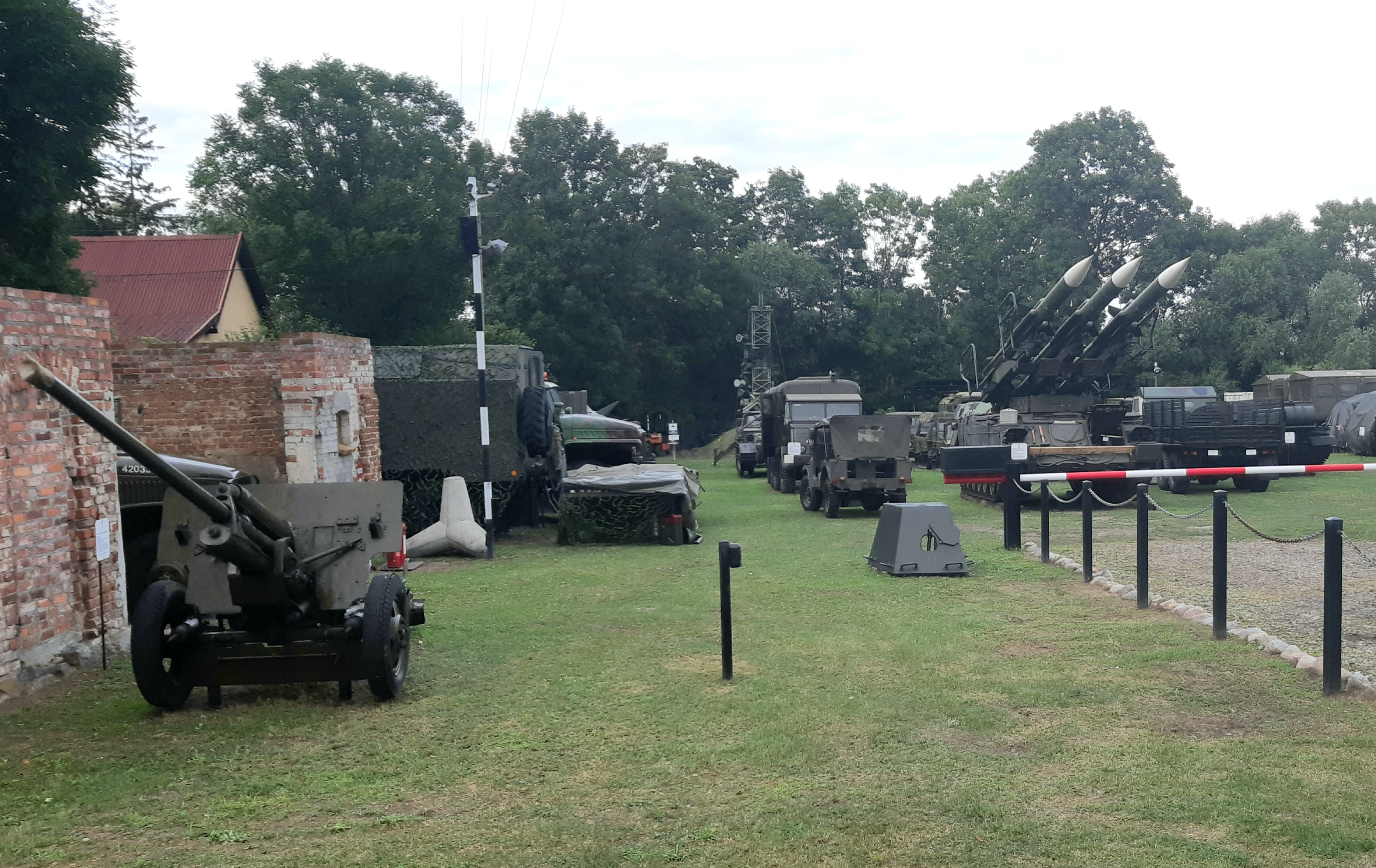 Wystawa pojazdów militarnych w Gościejewie, Gmina Rogoźno, Wielkopolska.